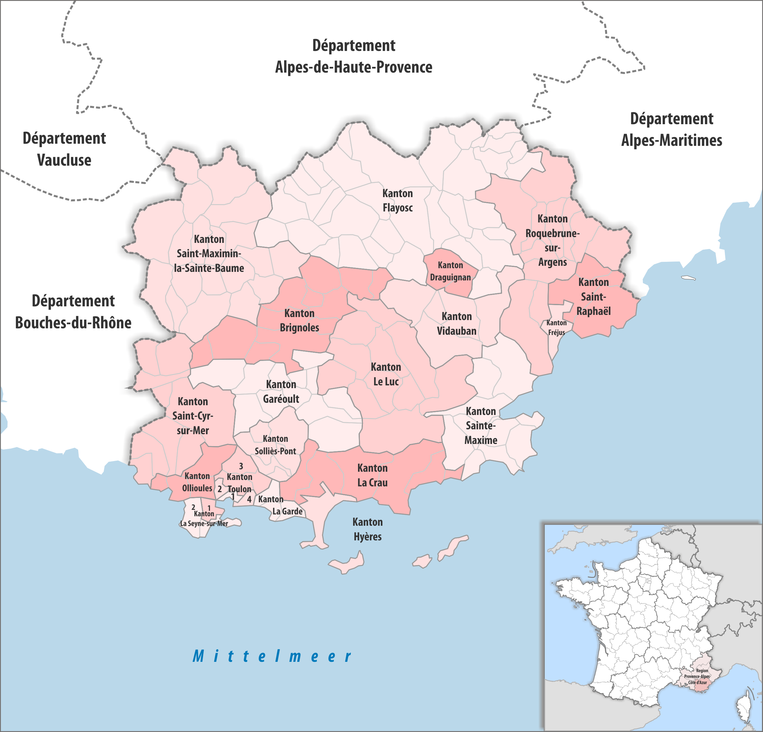 Gemeinden und Kantone im Departement Var